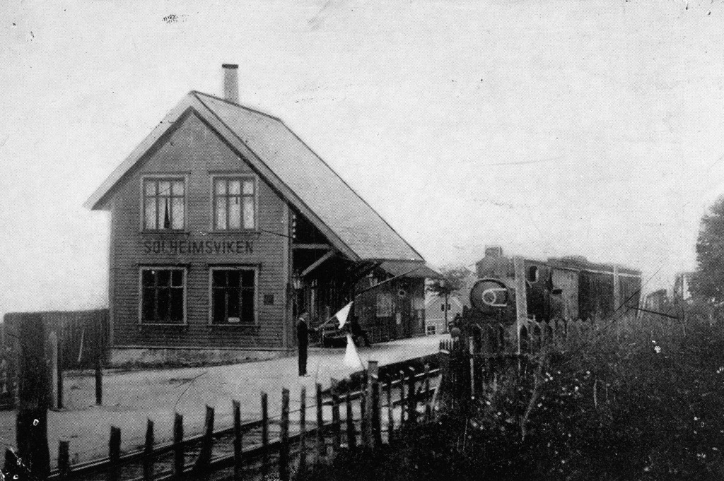 Solheimsviken stasjon på nedlagt strekning av Vossebanen i Bergen. Ukjent fotograf, fra billedbasen Marcus.